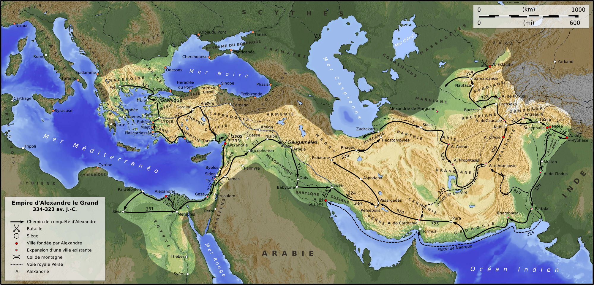 Etendue de l'empire d'Alexandre le Grand.